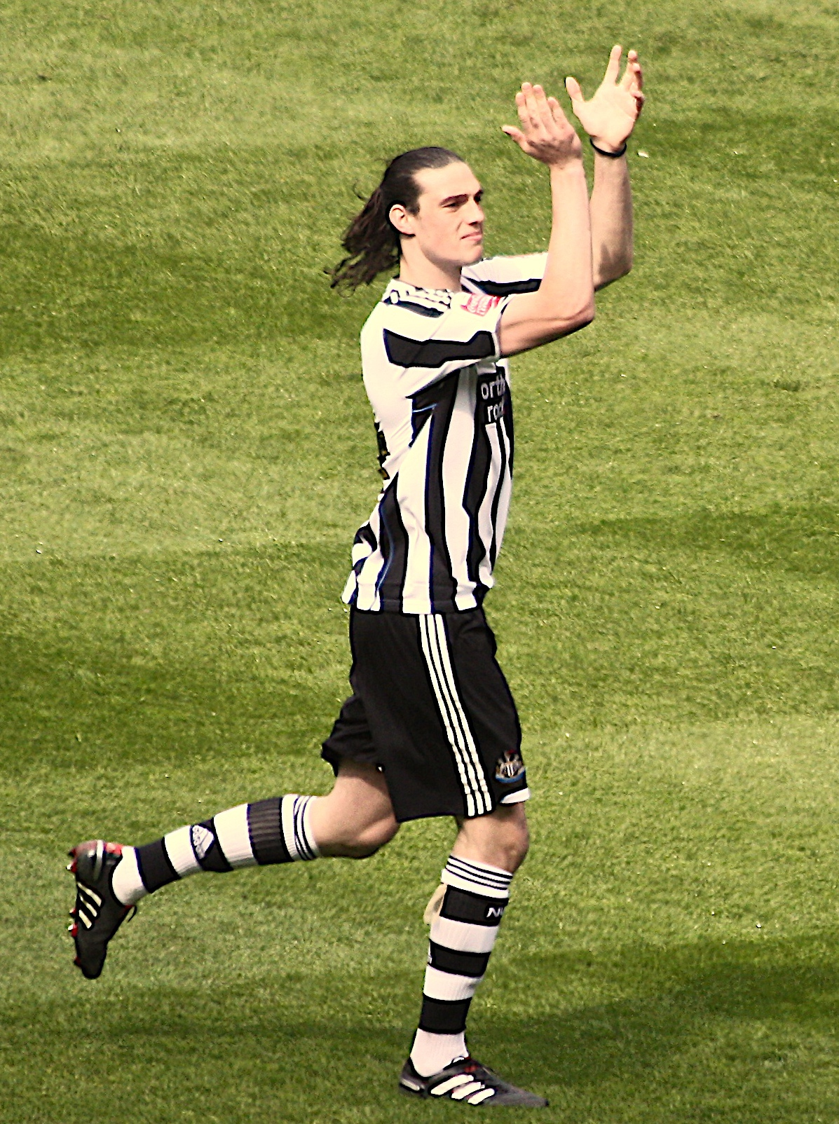 Andy Carroll